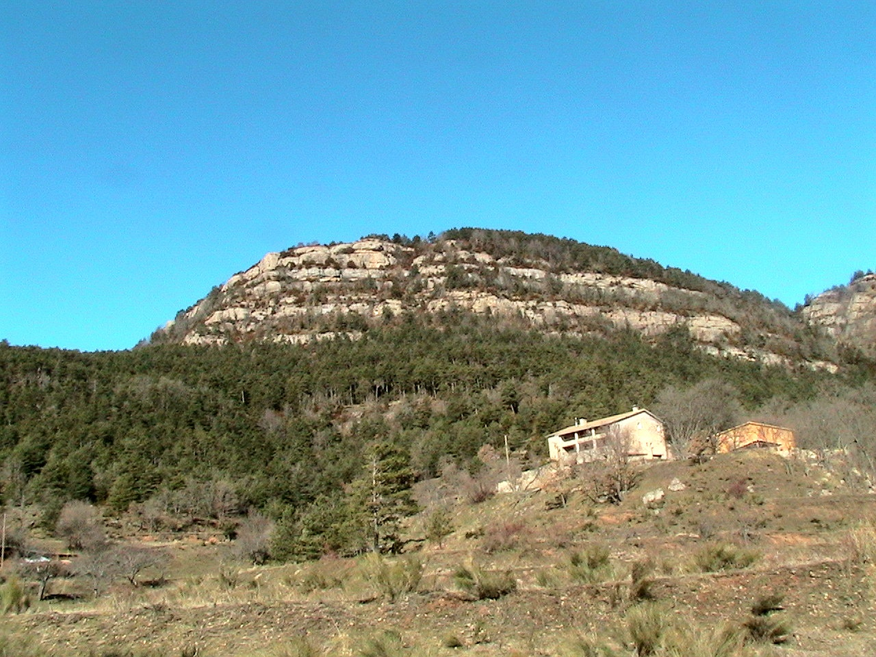 El Serrat de Runers, a l'extrem de llevant de la Serra dels Tossals, sobre la masia de la Vila. Capolat (Berguedà - Catalunya)